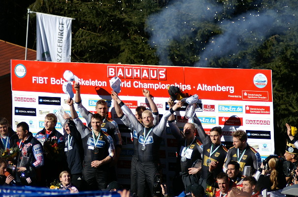 Siegerehrung 1. GER1 LANGE Andre (Mitte) 2. RUS1 ZUBKOV Alexandr (links) 3. GER3 HÖPFNER Matthias (rechts)